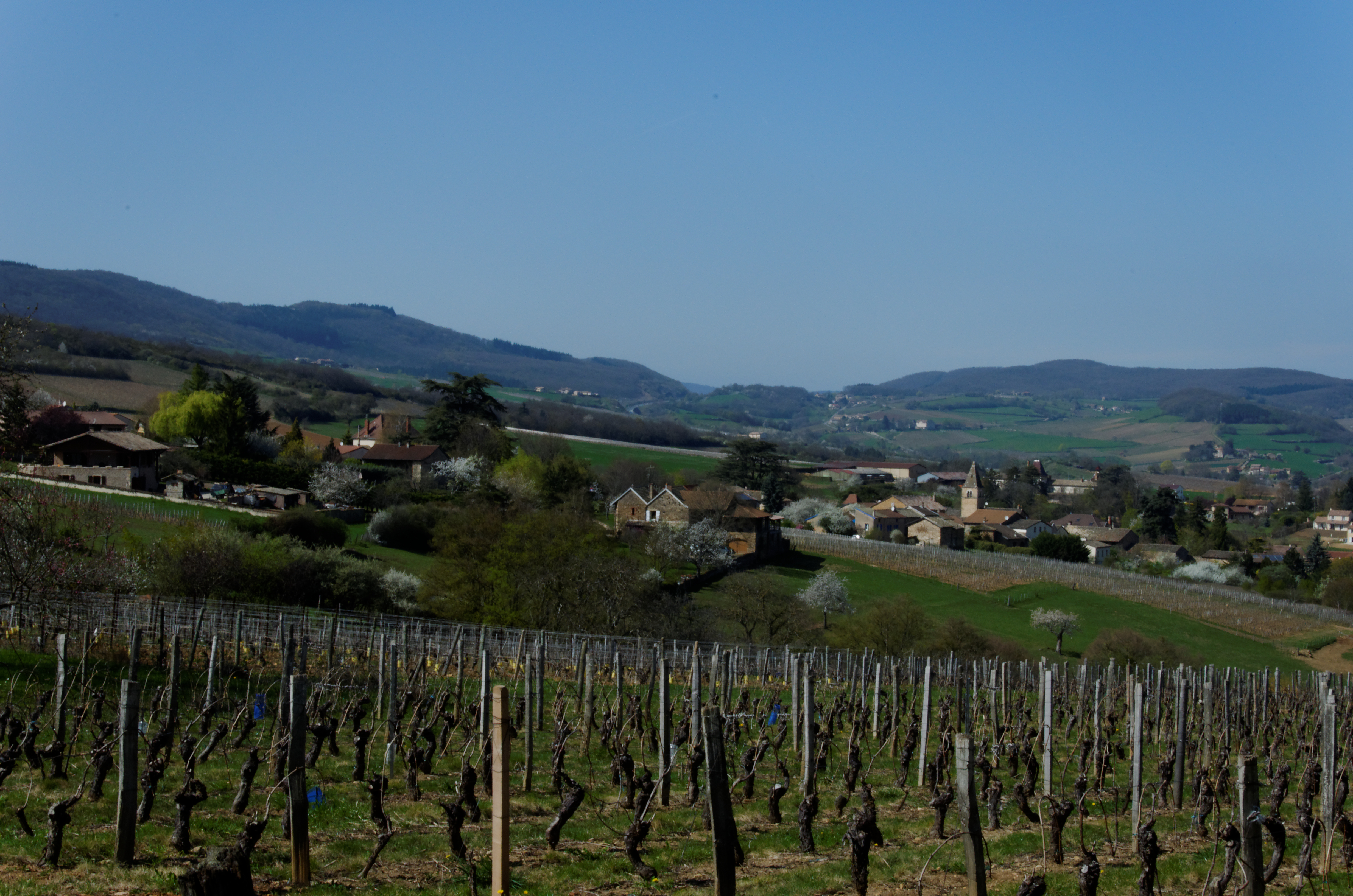 Vue sur Milly Lamartine, Saône et Loire (71), France